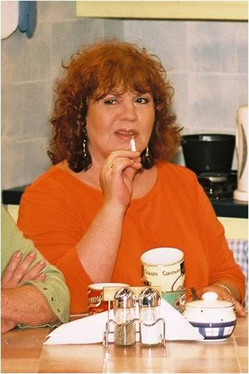 תיקי דיין מתוך הסדרה "קרובים קרובים"